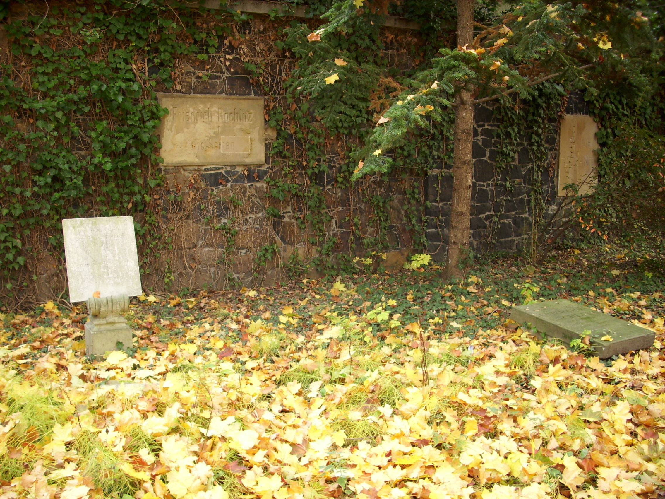 Grabstätte Familie Johann Friedrich Rochlitz, Alter Johannisfriedhof Leipzig